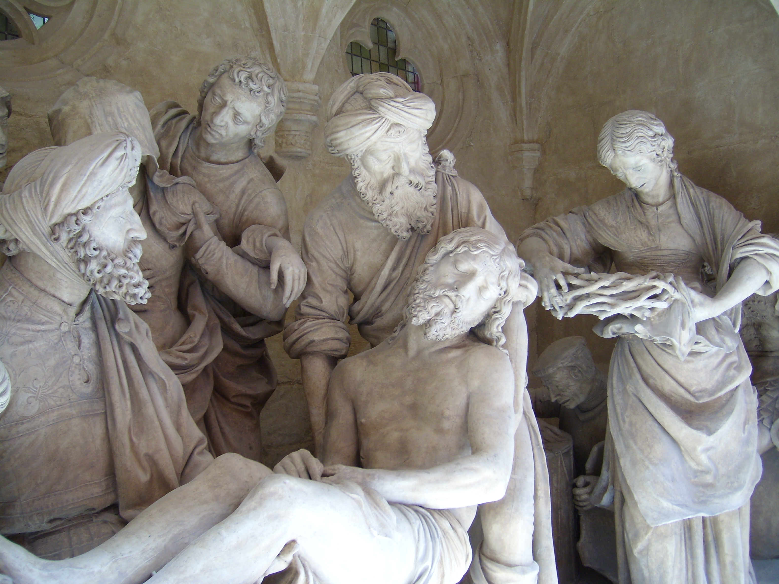 La Mise au Tombeau de Saint-Mihiel par Ligier Richier, moulage exposée à la Galerie des moulages, Musée des Monuments français, Paris